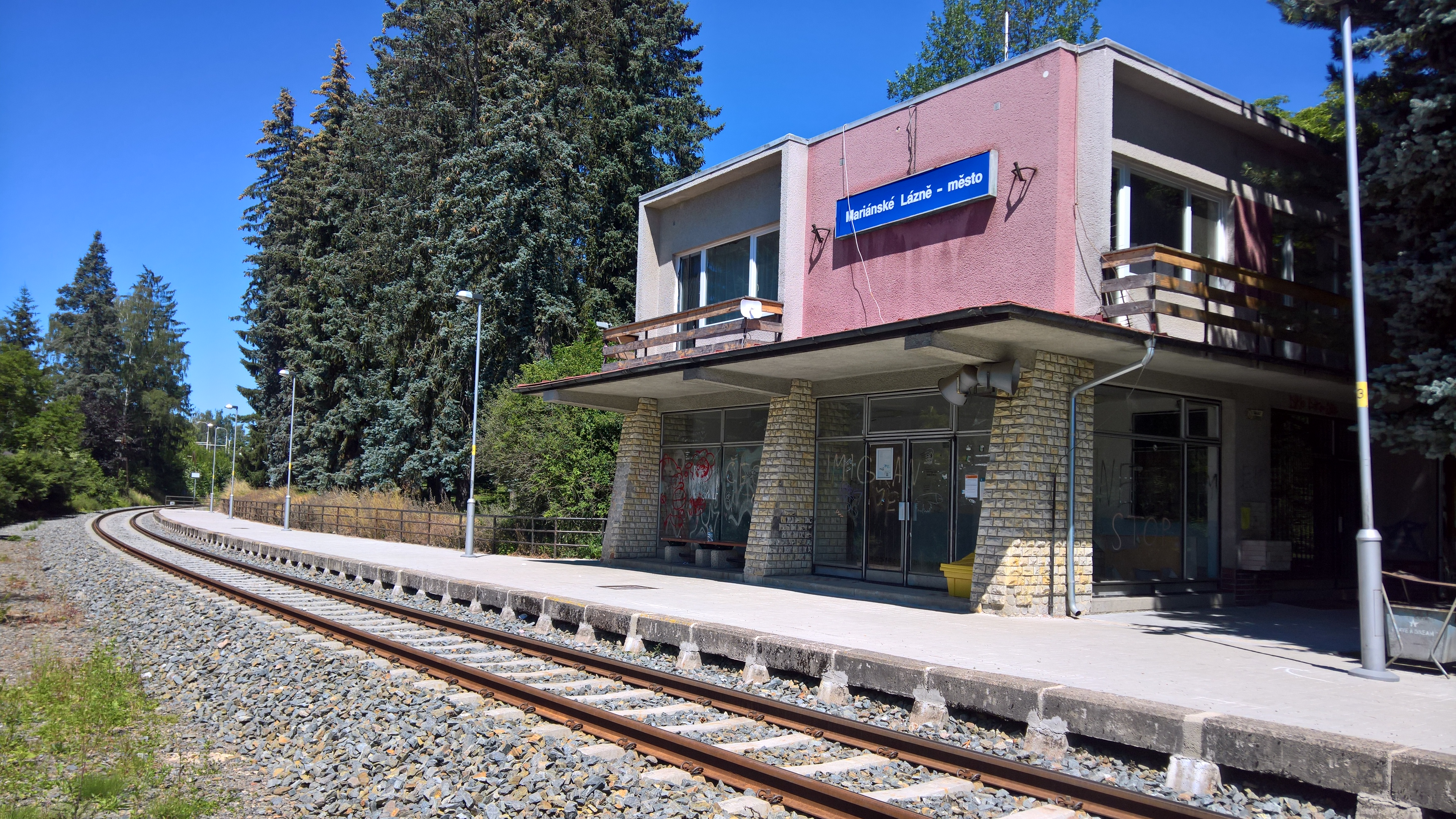 Staniční budova s částí nástupiště po částečné rekonstrukci